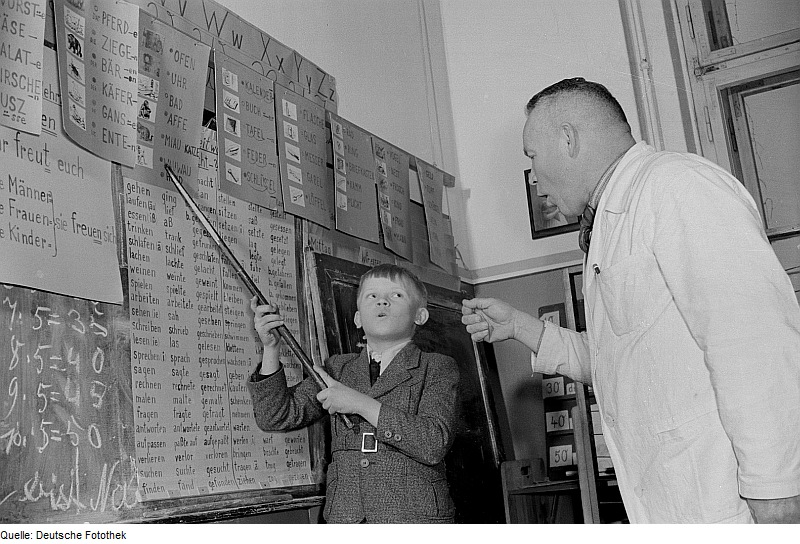 Original image description from the Deutsche FotothekSchüler bei einer Sprech- und Leseübung